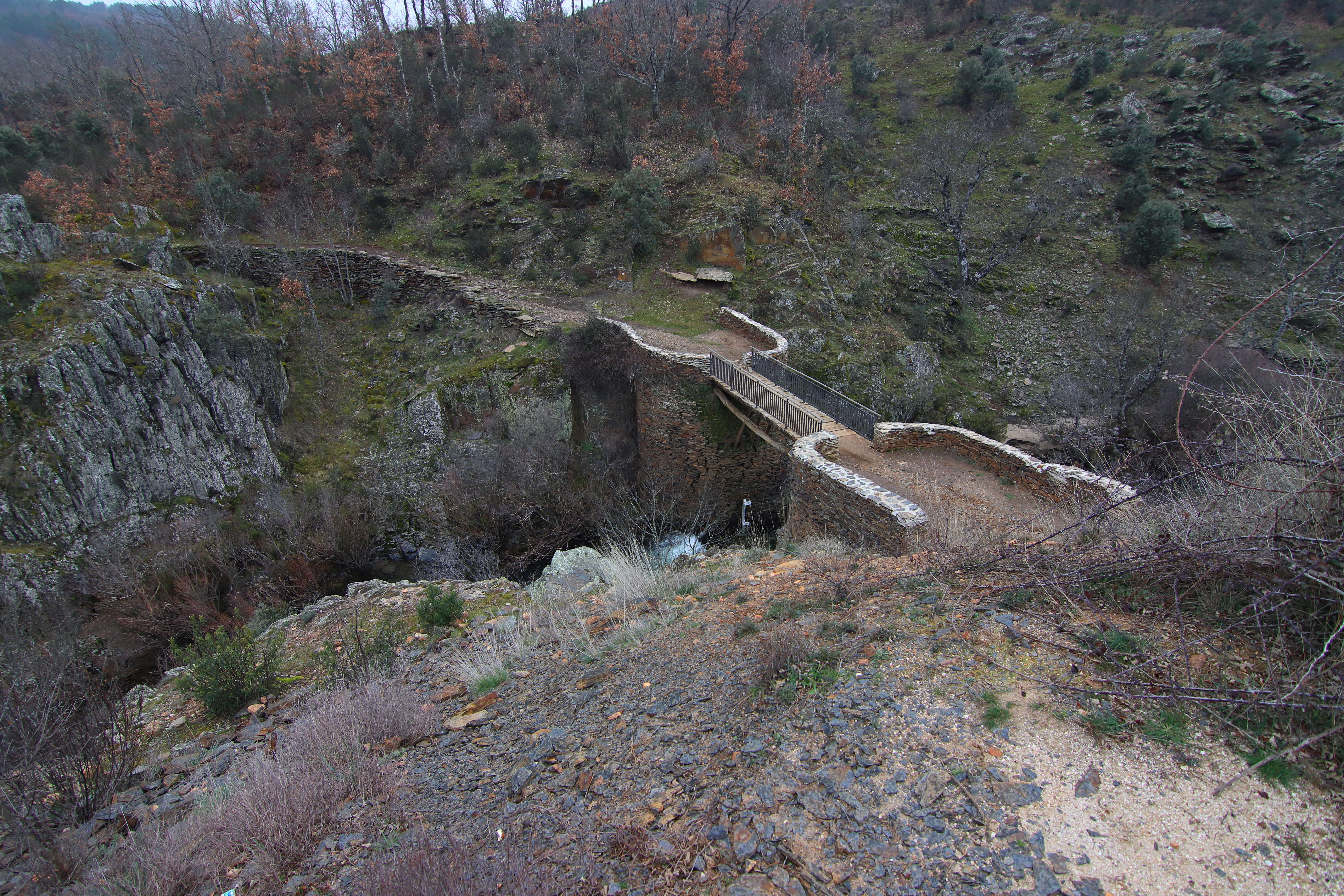 Puente de los Trillos, sobre el río Jarama, Matallana